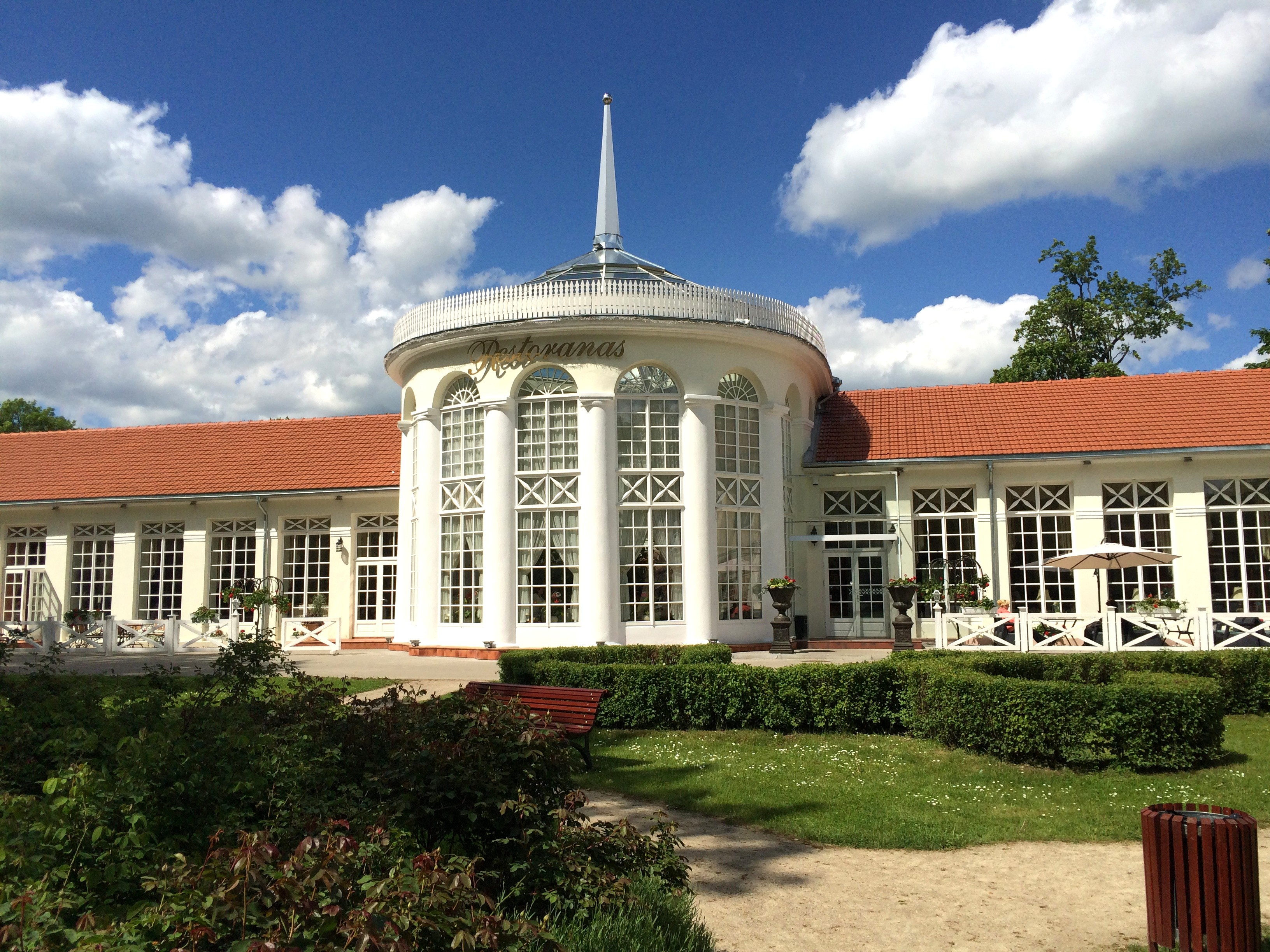 Raudondvario dvaro sodybos oranžerija